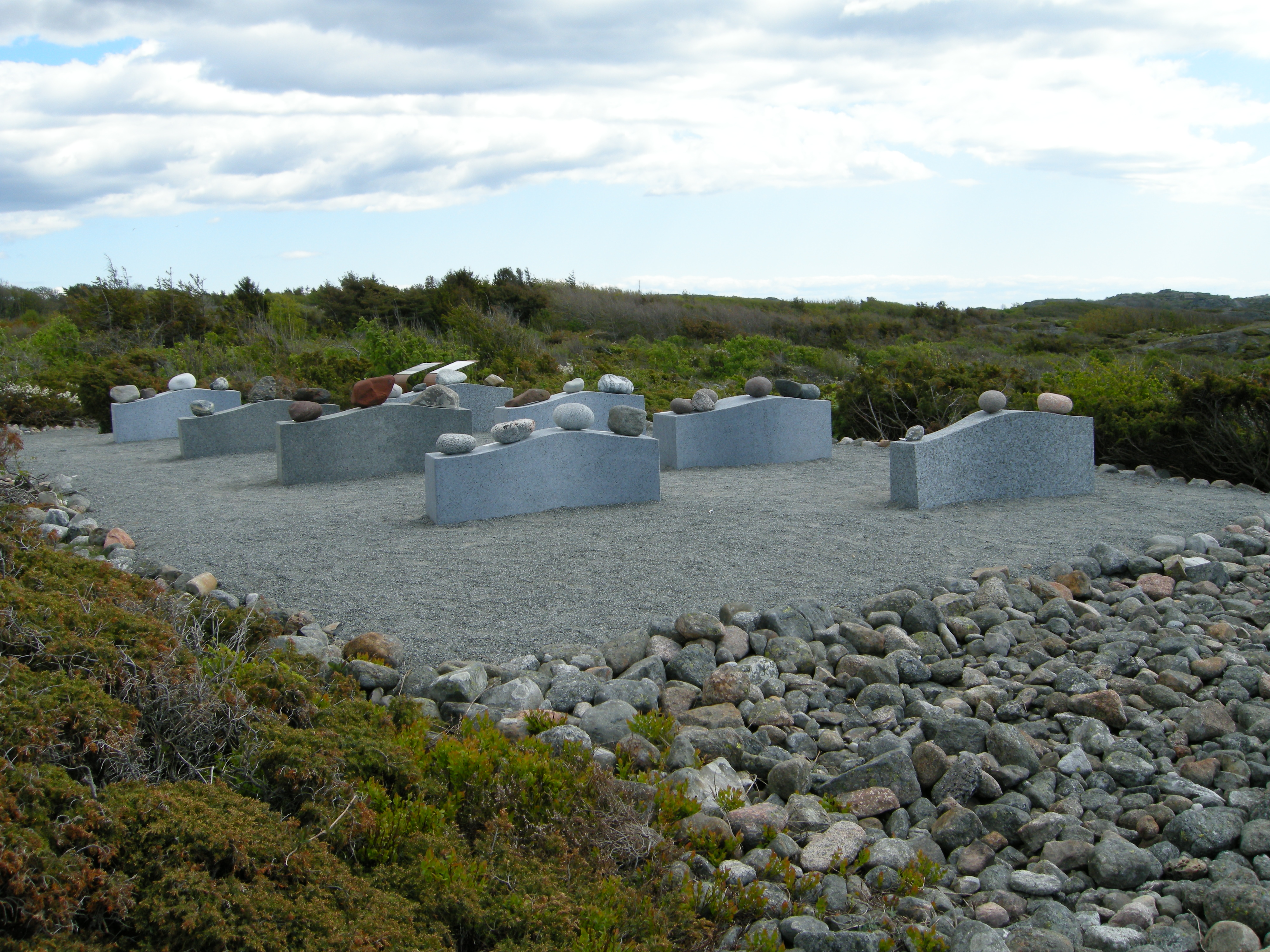 Gea Norvegica Geopark, Mølen i Brunlanes, Larvik